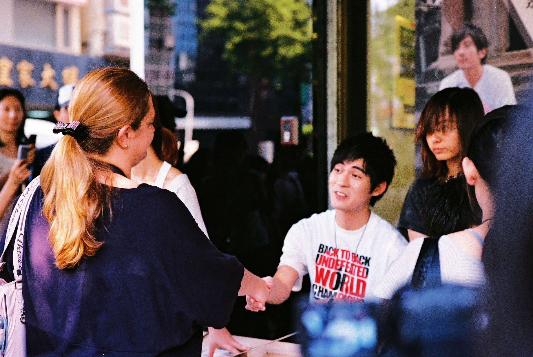 F4成員仔仔（周渝民）。Bân-lâm-gú: F4 sîng-guân Tsú-tsú(Tsiu Jû-bîn). F4成員仔仔（周渝民）。